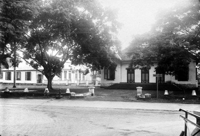 Repronegatief. Reproductiebedrijf Topografische Dienst